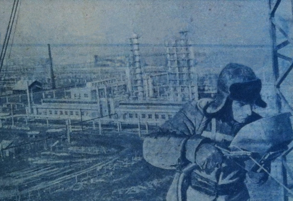 Construcția Rafinăriei Nr. 10 Onești, în prim-plan sudorul Gheorghe Agreșanu.